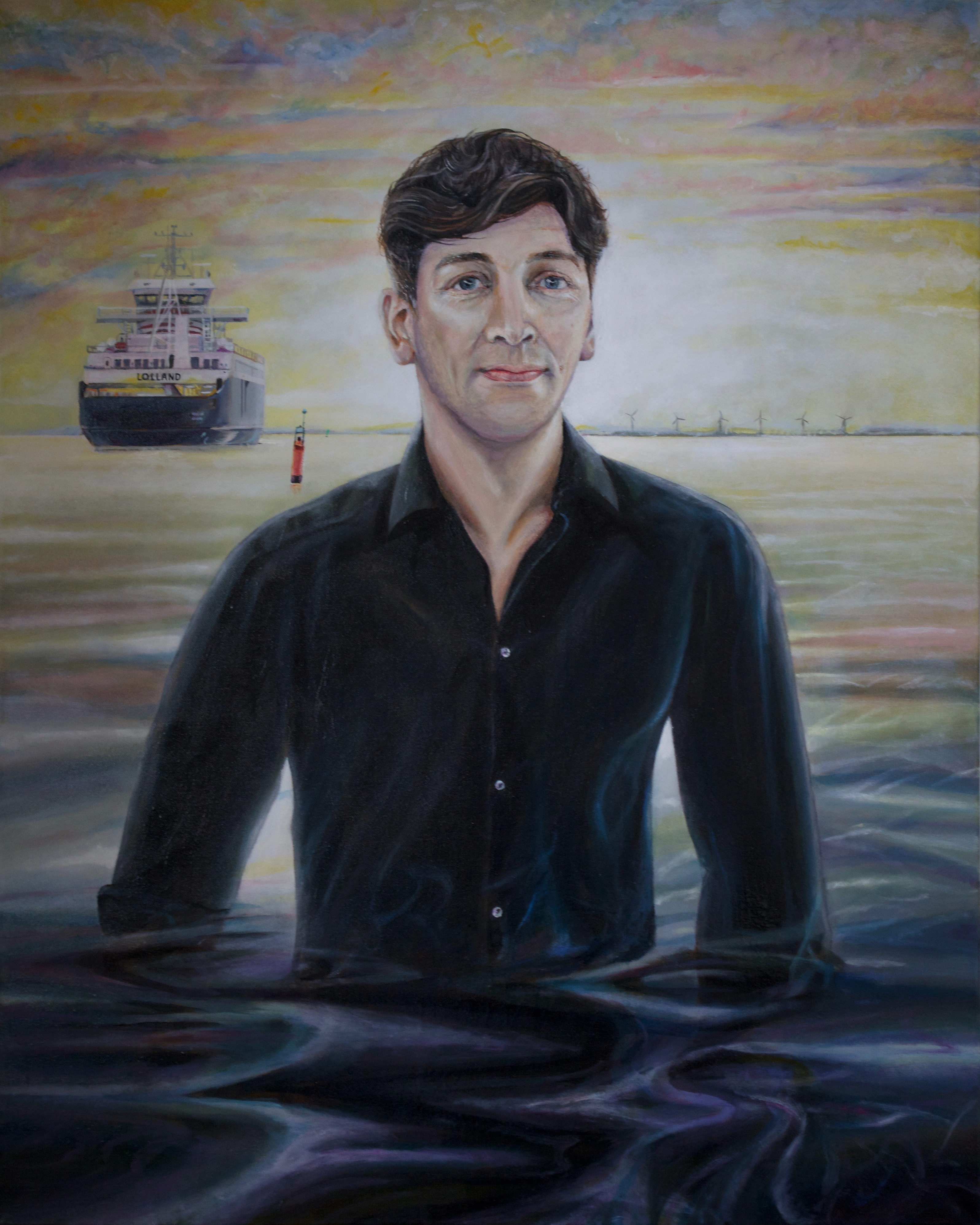 9E, (Jesper Wung Sung), Akryl og olie på lærred 80x100cm, 2018, anders dyhr.